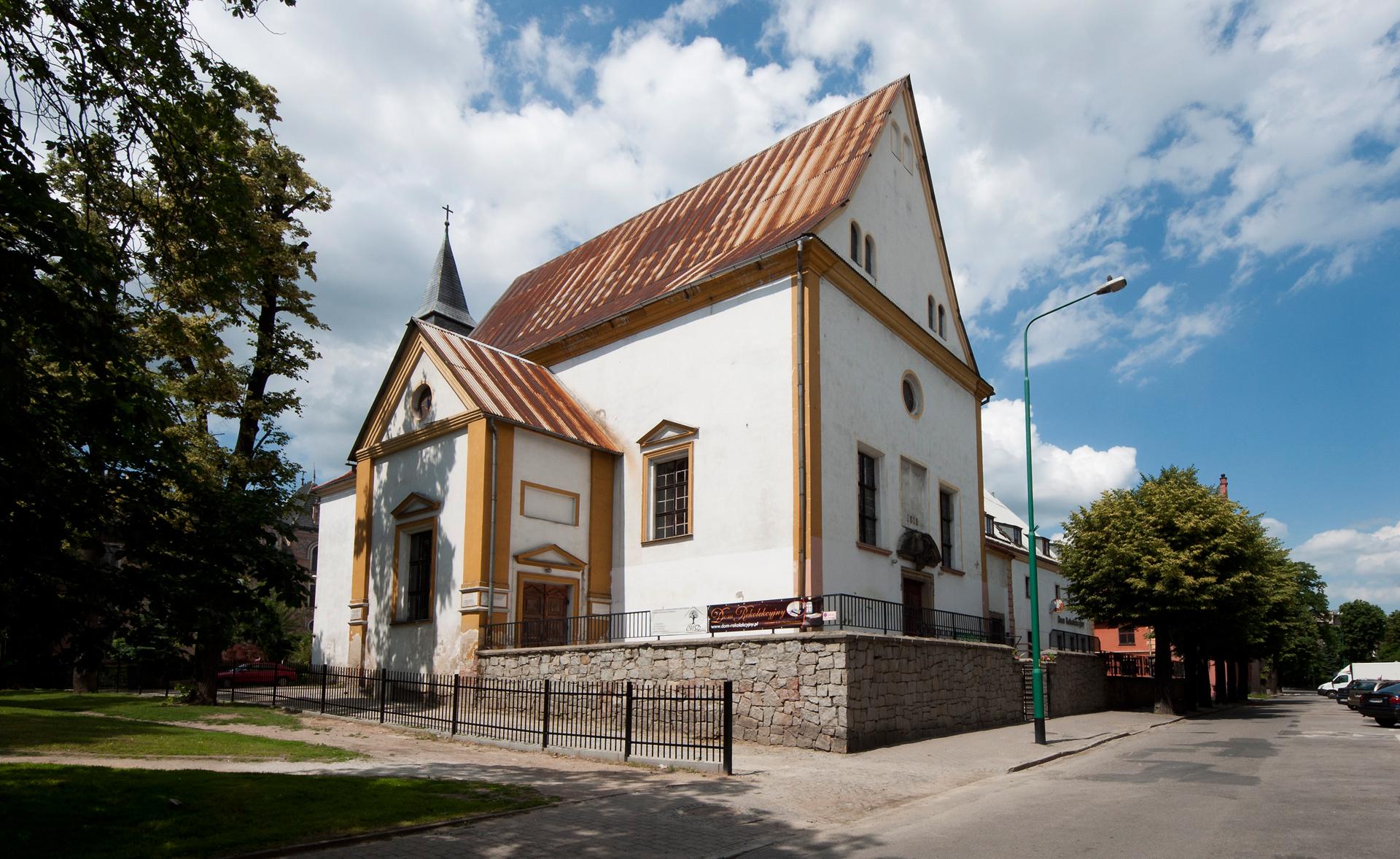 kościół klasztorny Kapucynów p.w. św. Antoniego, ob. Zbór Zielonoświątkowców- klasztor Kapucynów, ob. m.in. plebania Zielonoświątkowców Świdnica, Zamkowa 6, 1, Świdnica